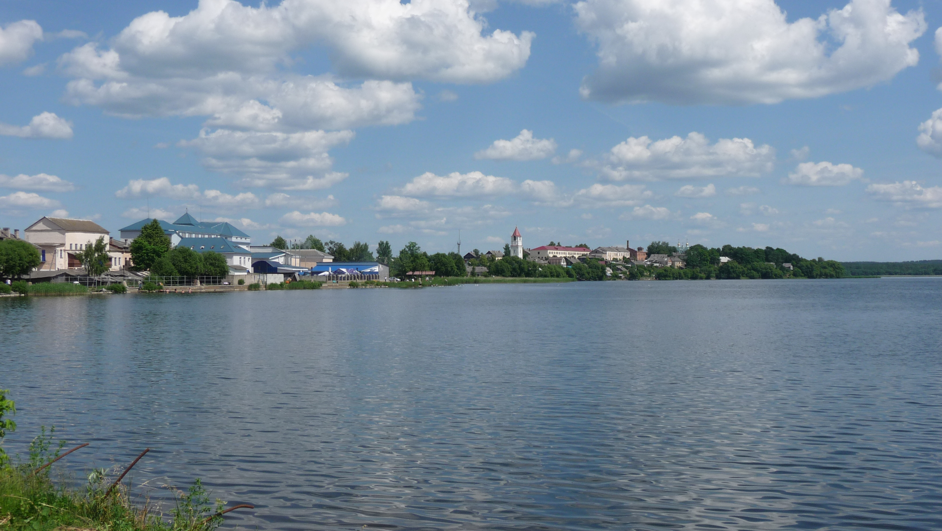 Панорама Себежа с берега Себежского озера